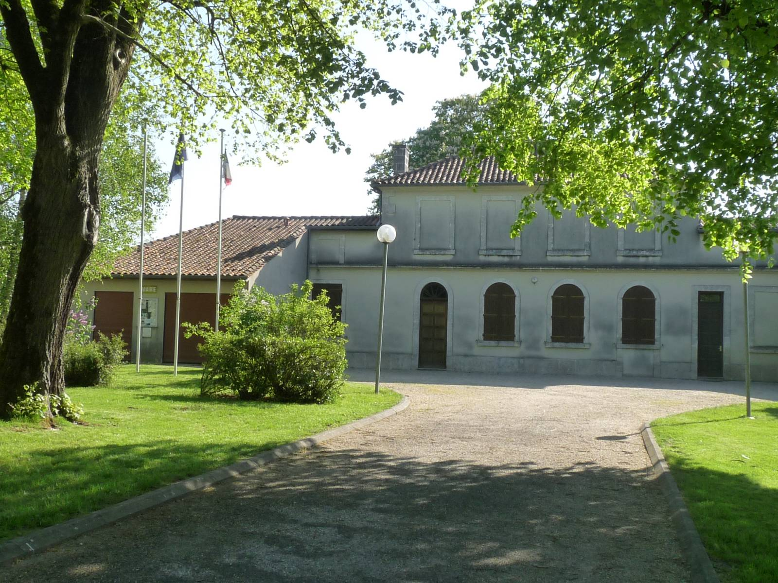 Mairie de Bonneville à Patreville, Charente, France